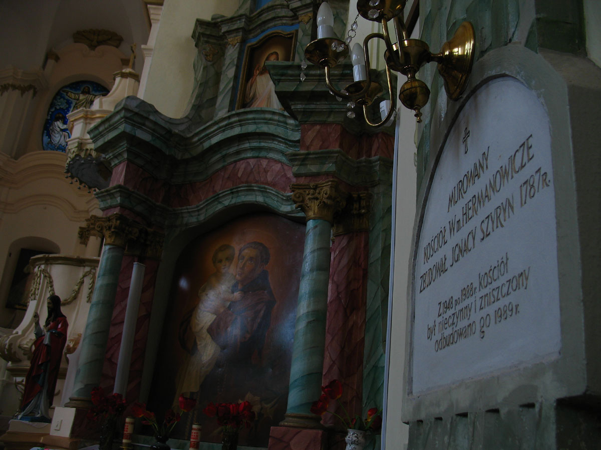 Беларуская (тарашкевіца): Германавічы